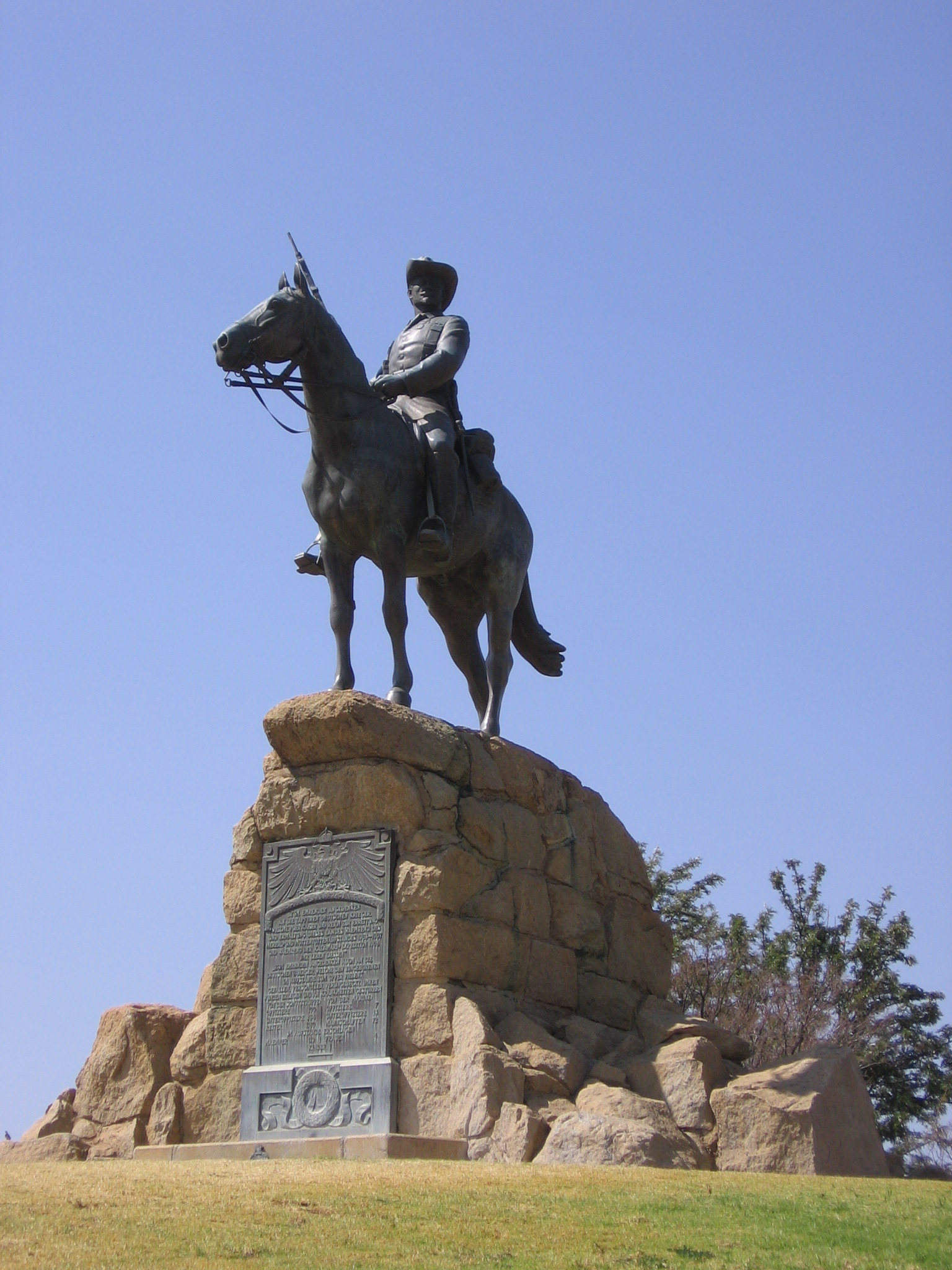 Das Südwest-Reiterdenkmal in Windhoek